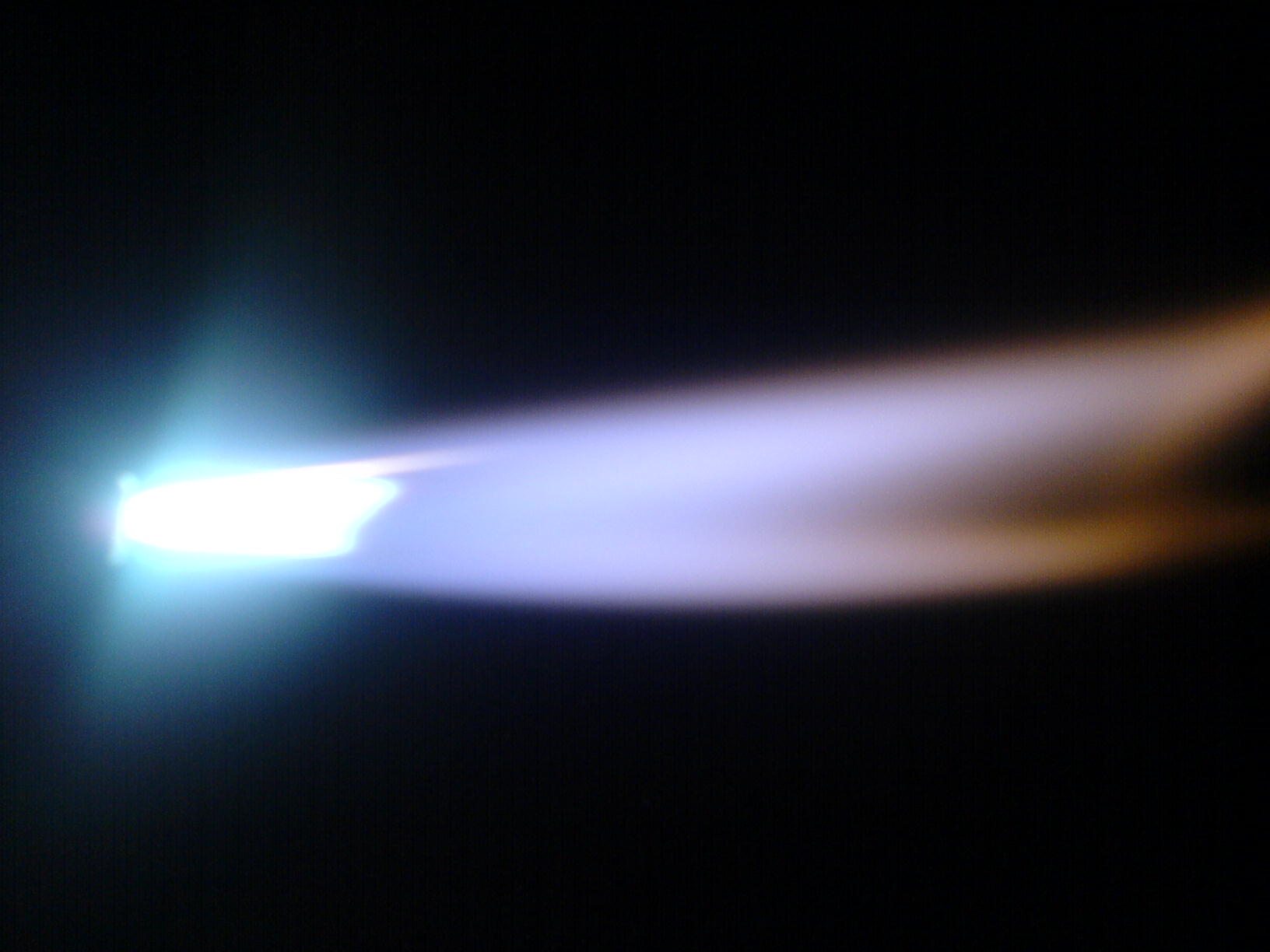 Ацетилено-кислородное пламя (температура «ядра» 2621°С) На фотографии изображено пламя сгорающей ацетилено-кислородной смеси. Температура измерена яркостным пирометром и соответствует 2621°С(в «ядре»)